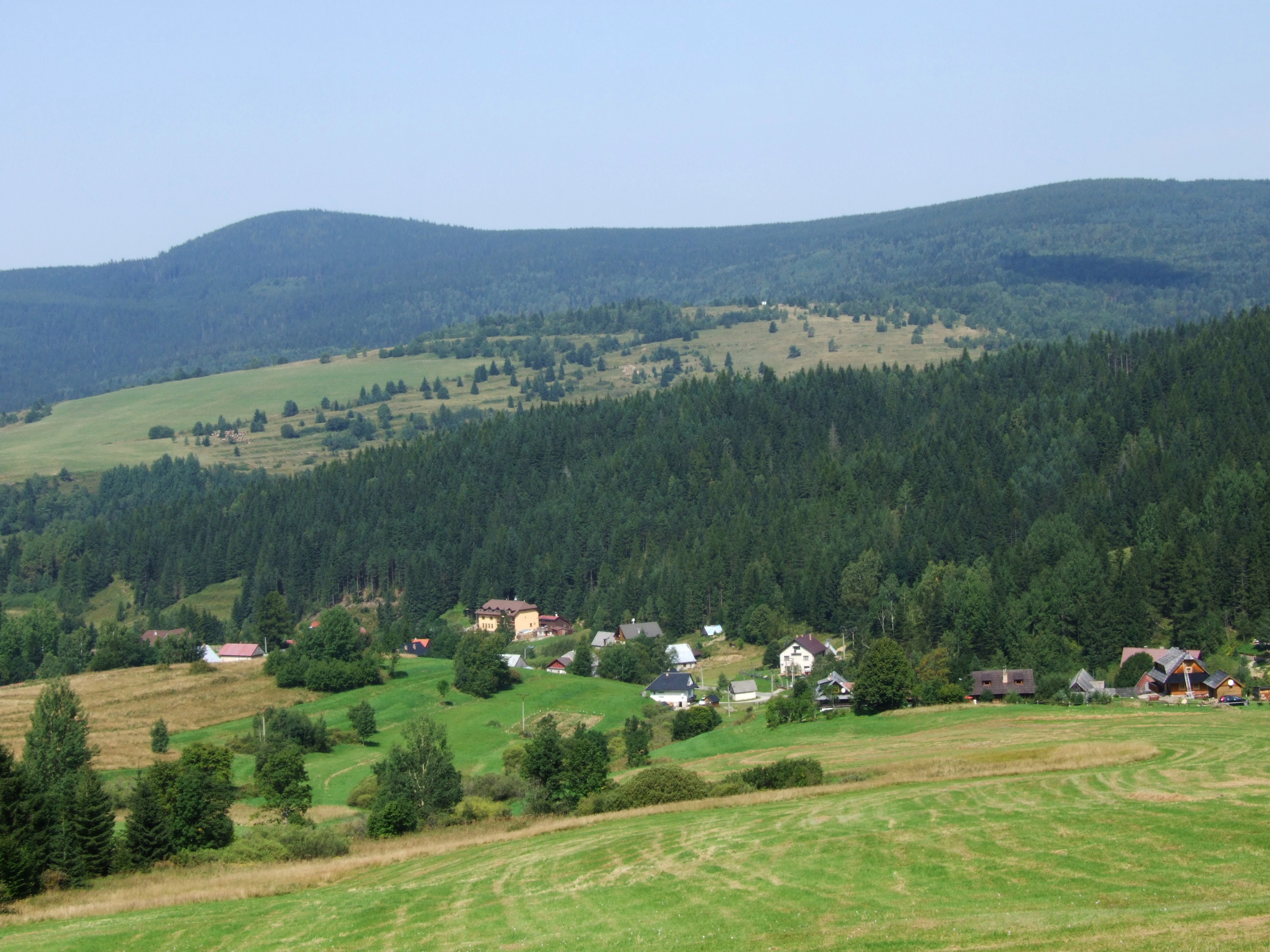 Huty (miejscowość na Słowacji). Ogólny widok jednego z przysiółków